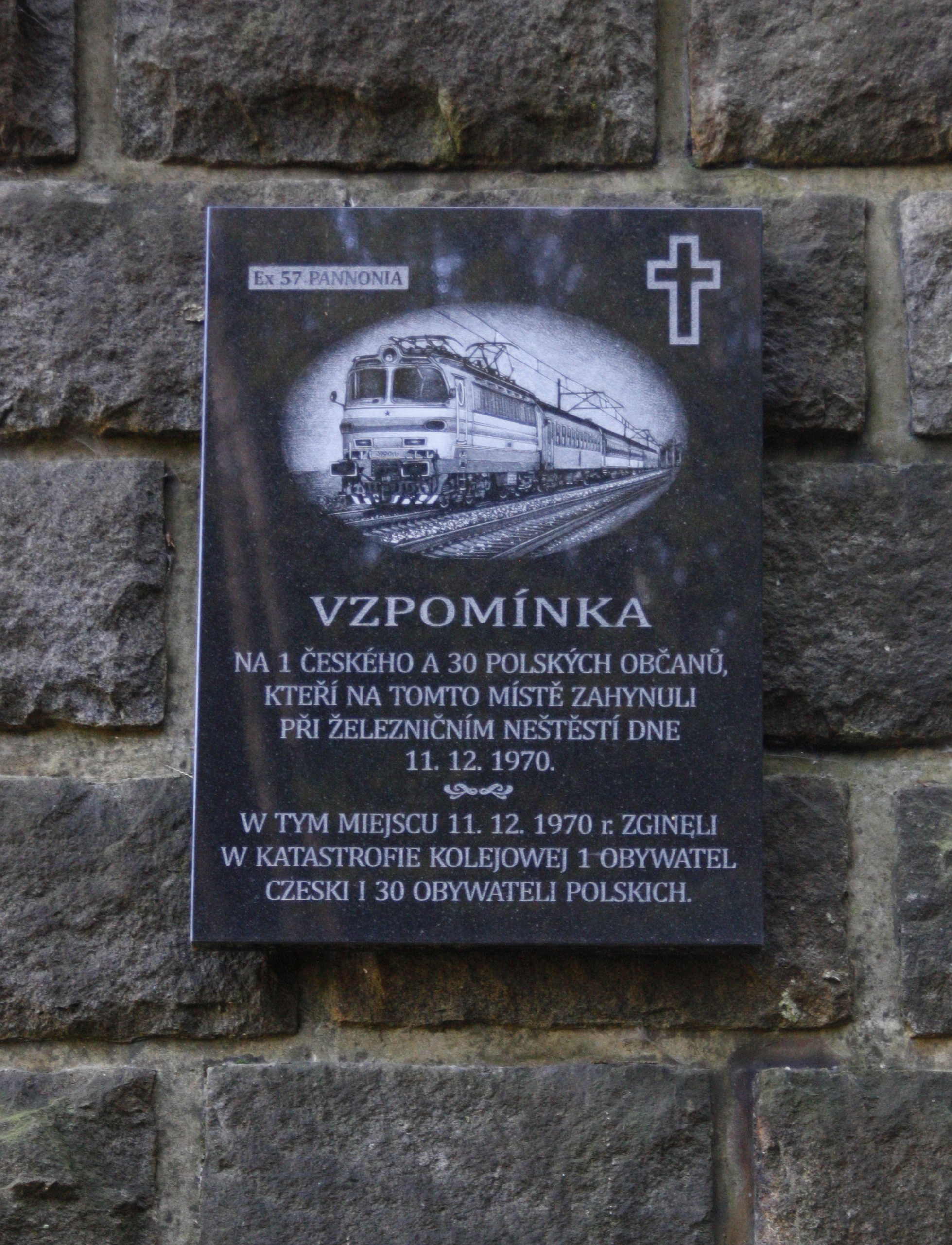 Lubné - velký železniční viadukt Kutiny, pomník neštěstí v roce 1970.